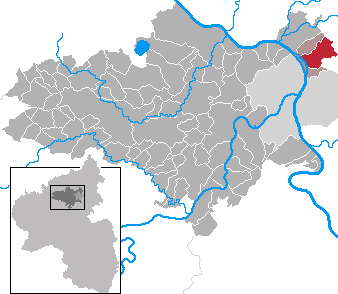 Vallendar in Rhineland-Palatinate - district Mayen-Koblenz